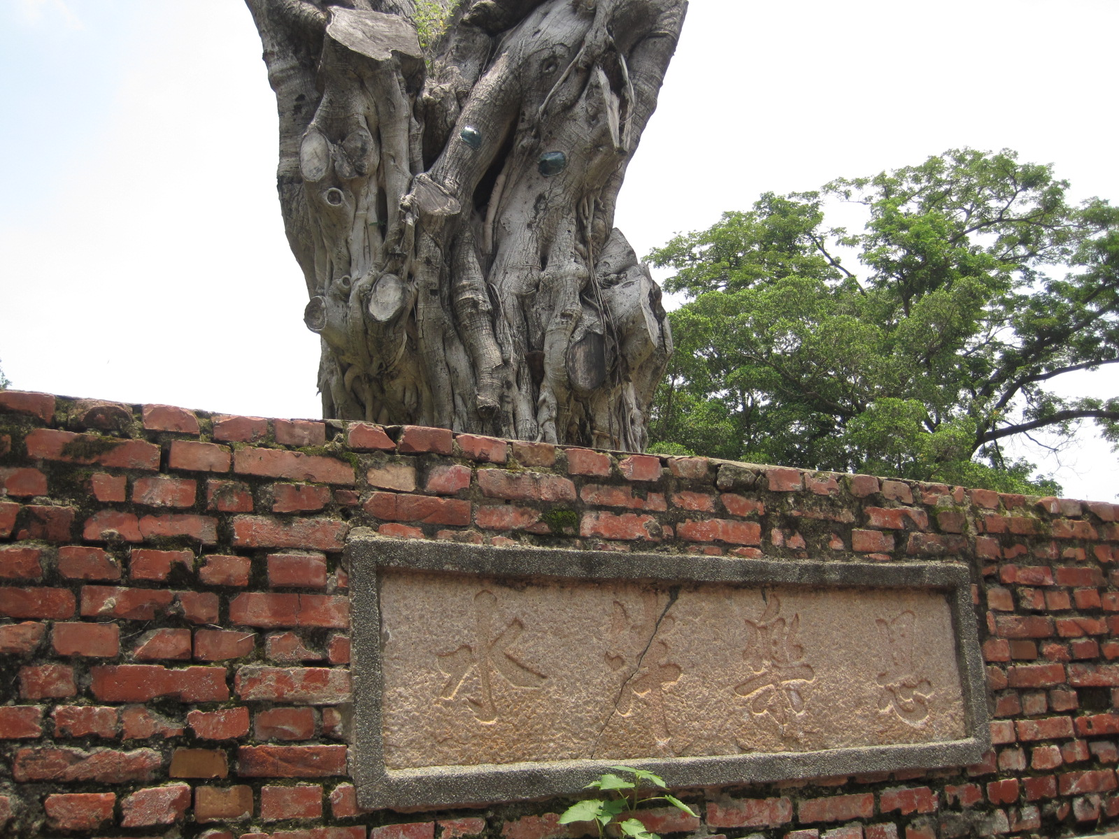 臺南孔廟思樂泮水碑，後方是2011年確定死亡的老榕樹。